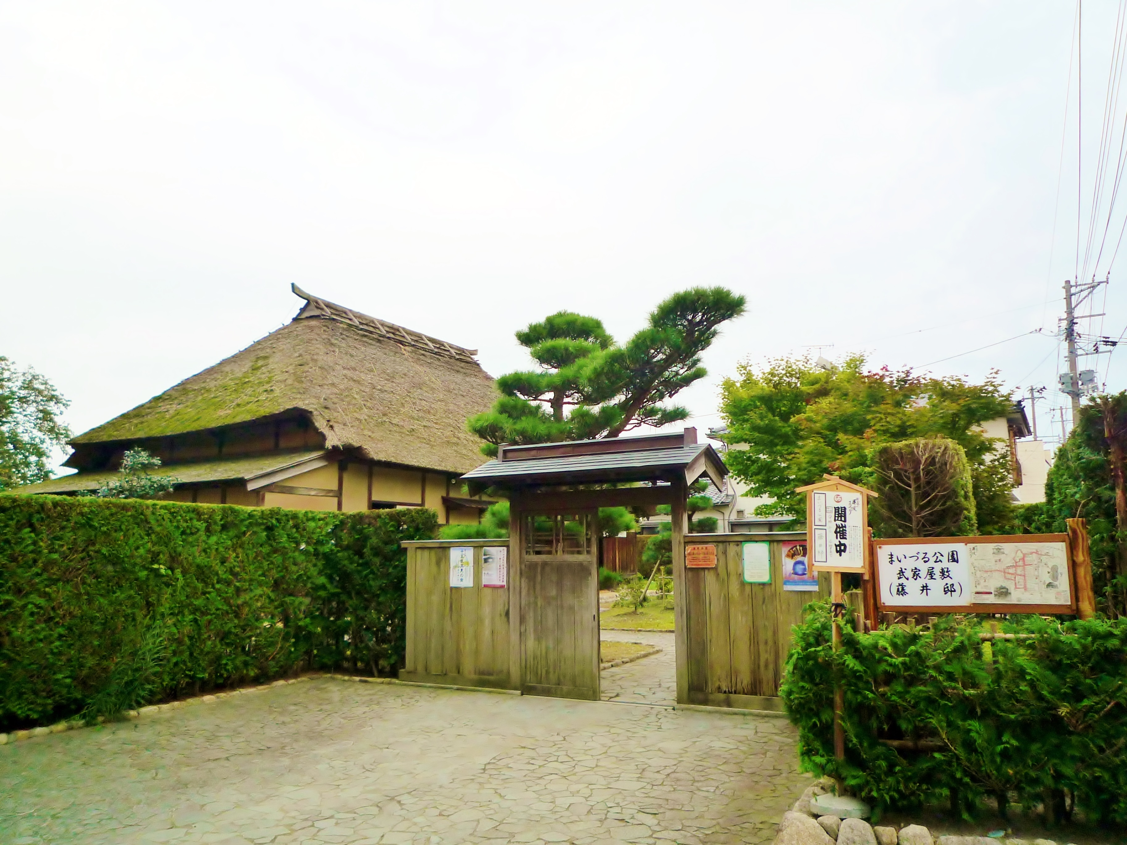 新潟県村上市の藤井邸